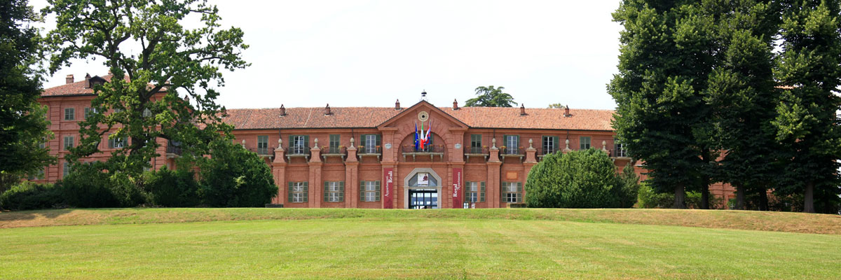 Veduta degli appartamenti reali di Borgo Castello nel parco naturale "La Mandria" a Venaria Reale (TO)